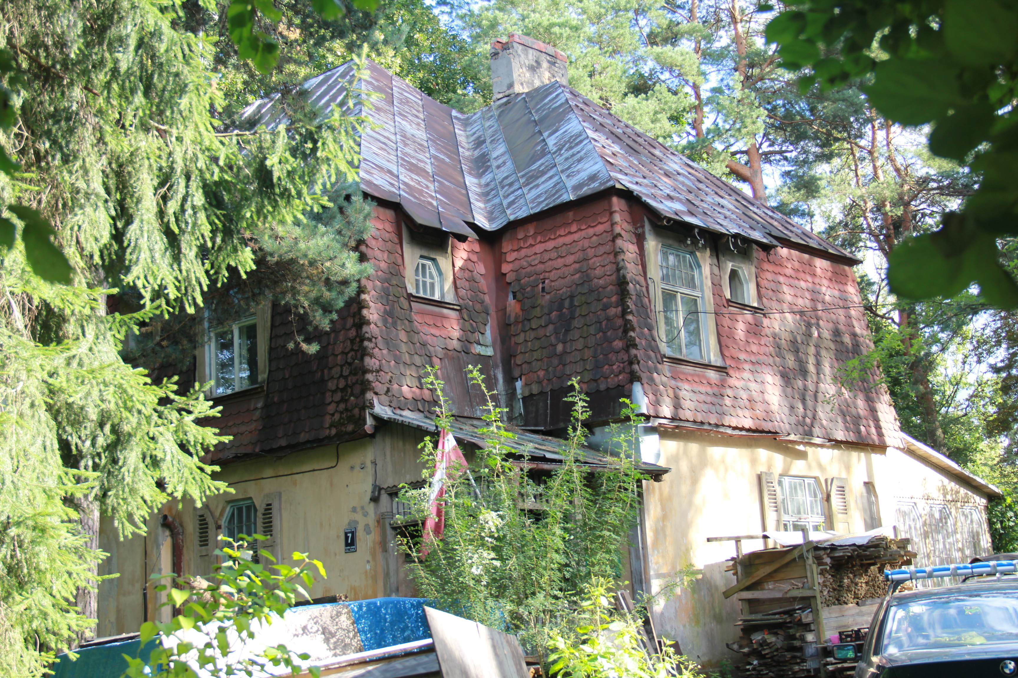 Savrupmāja, Rīga, Gdaņskas iela 7